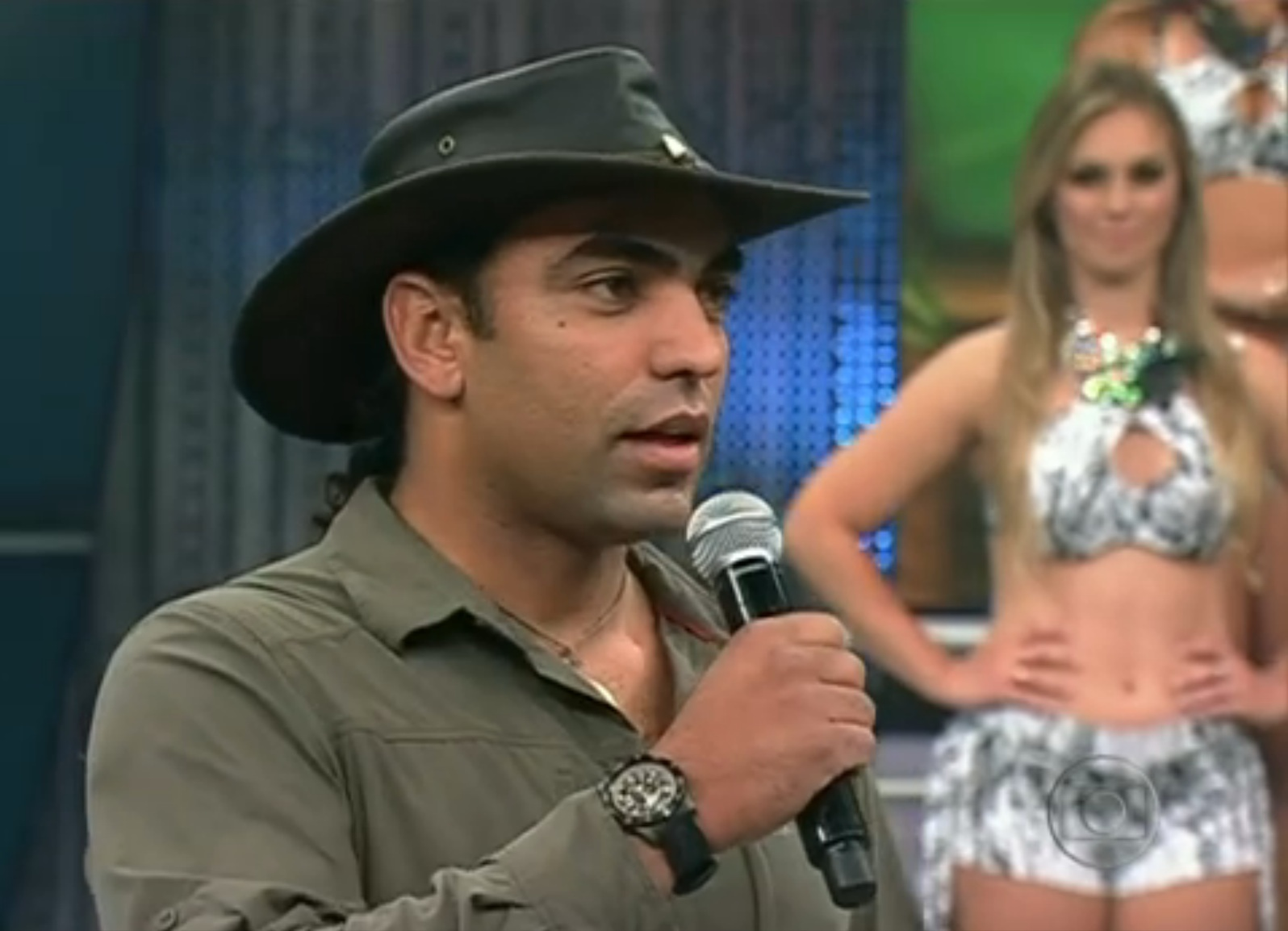 Cristian Dimitrius apresentando o quadro Domingão Aventura na Rede Globo